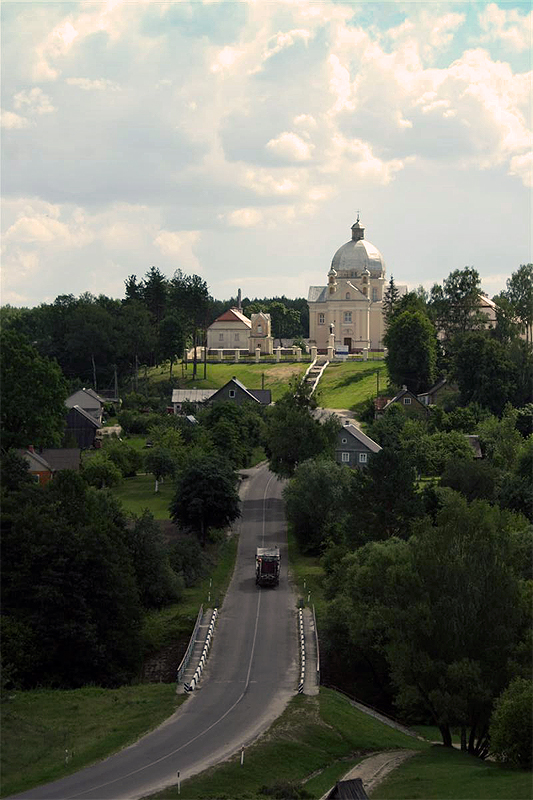 Liškiava.